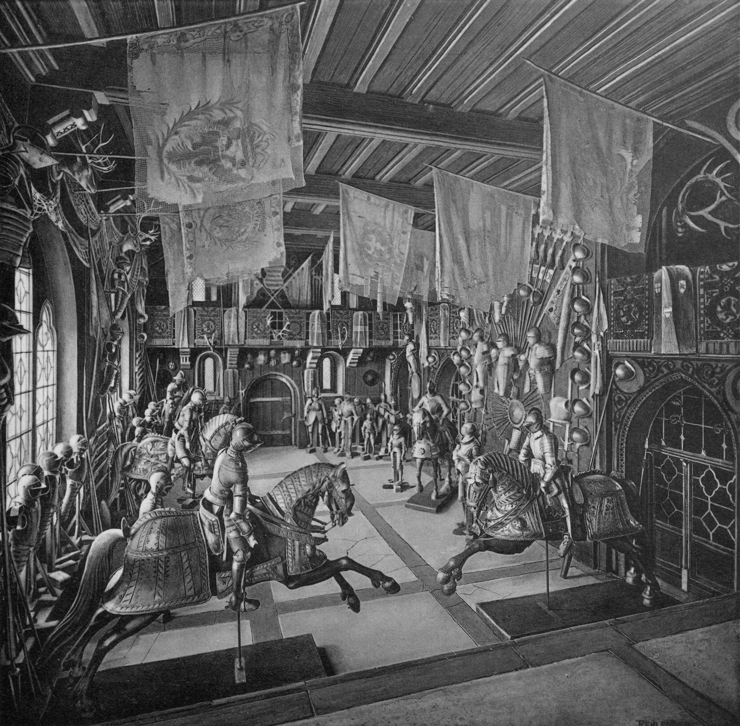 Originaltitel: Die Rüstkammer der Wartburg. Ansicht gegen Norden.